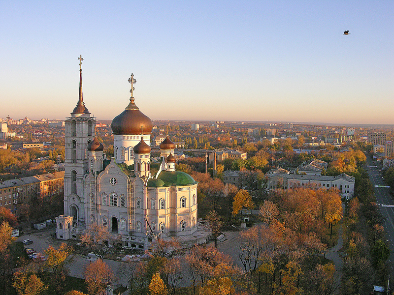 Благовещения Воронежский Собор